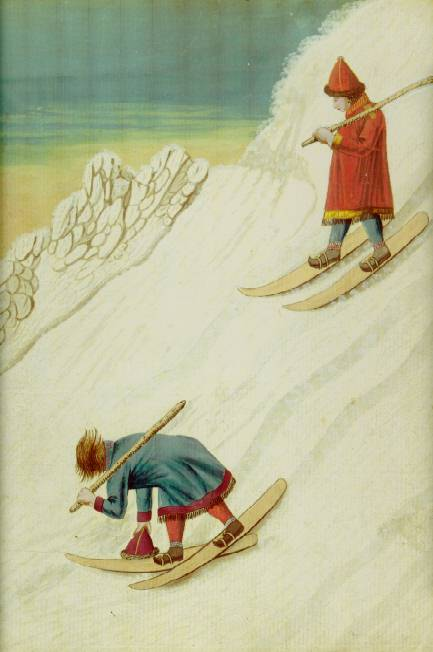 Skifahrende Samen